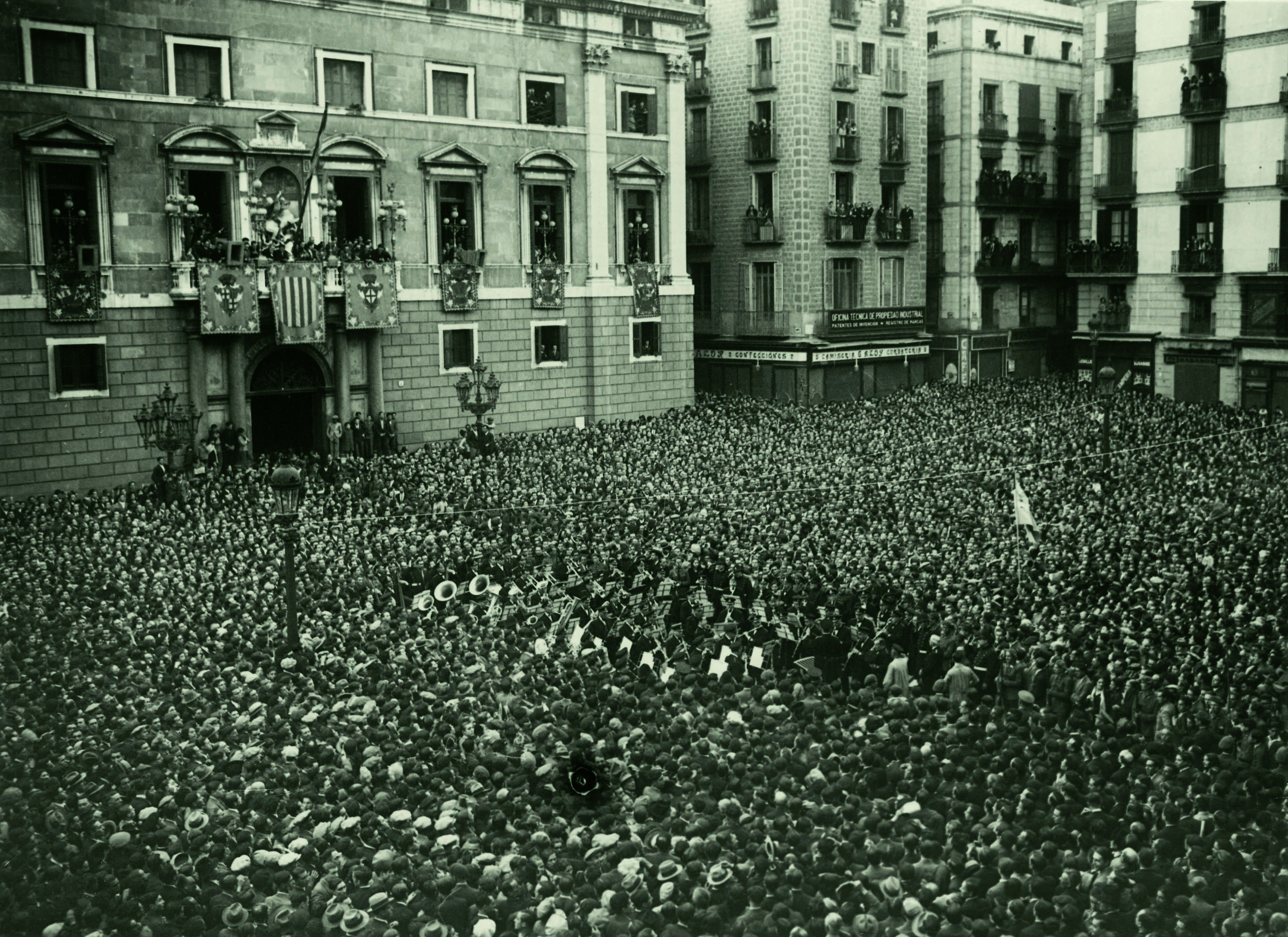 La Banda Municipal de Barcelona participa de la proclamació de la II República a la Plaça de Sant Jaume de Barcelona el 14 d’abril de 1931.